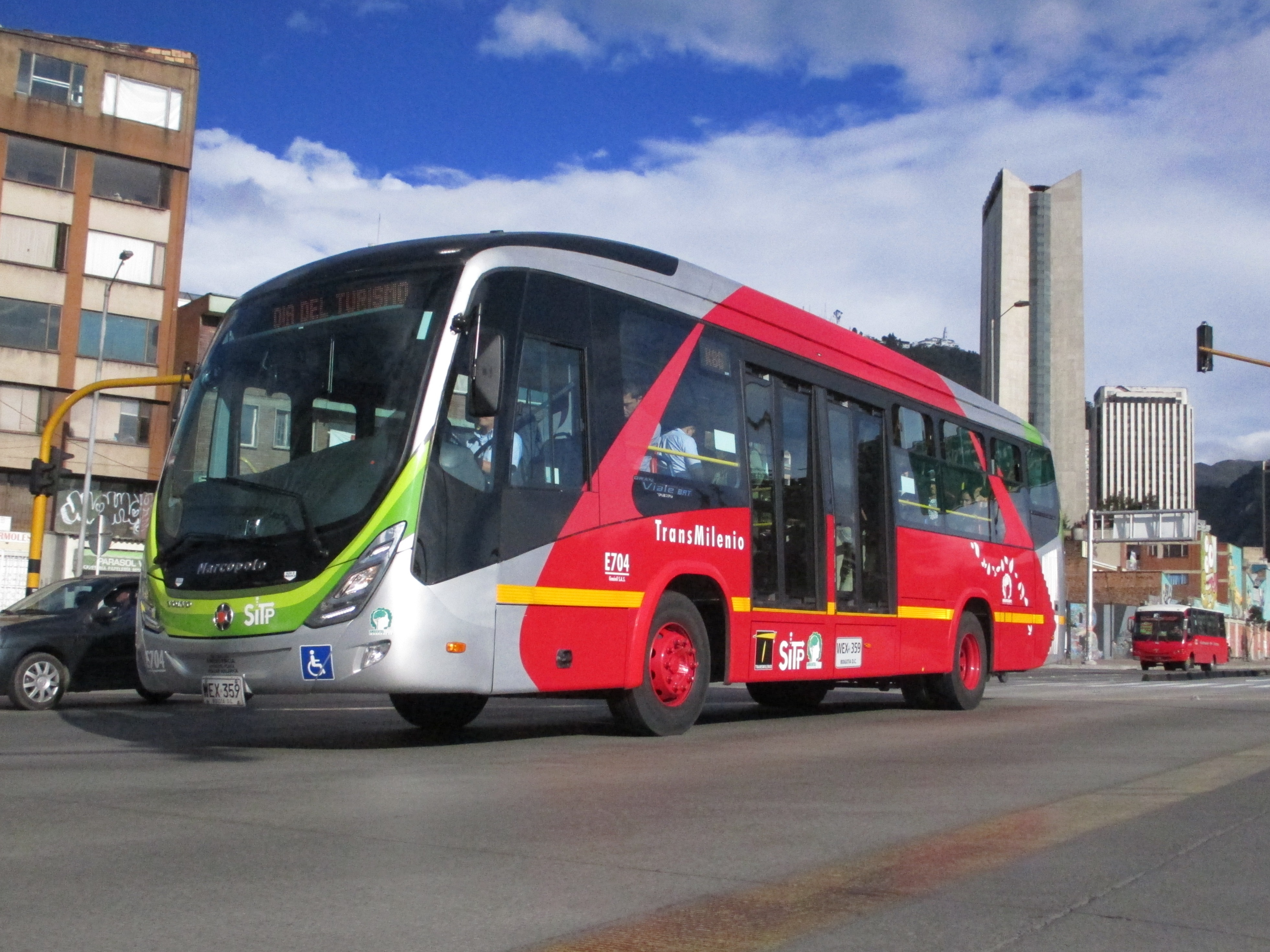 Bogotá, carrera 17 calle 26, bus TransMilenio